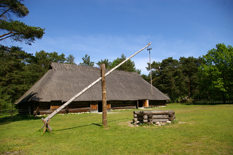 Estonian Open Air Museum, Sassi Jaani farmstead, 18-19 cen.